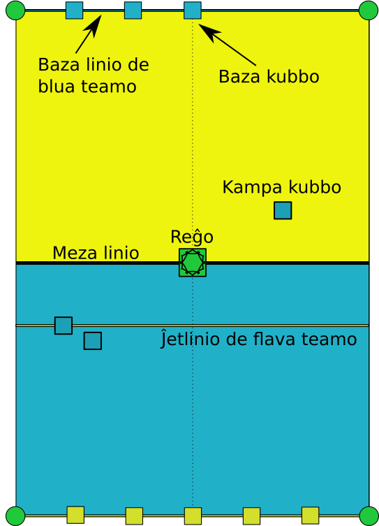 Montras eblan varianton de la ludo